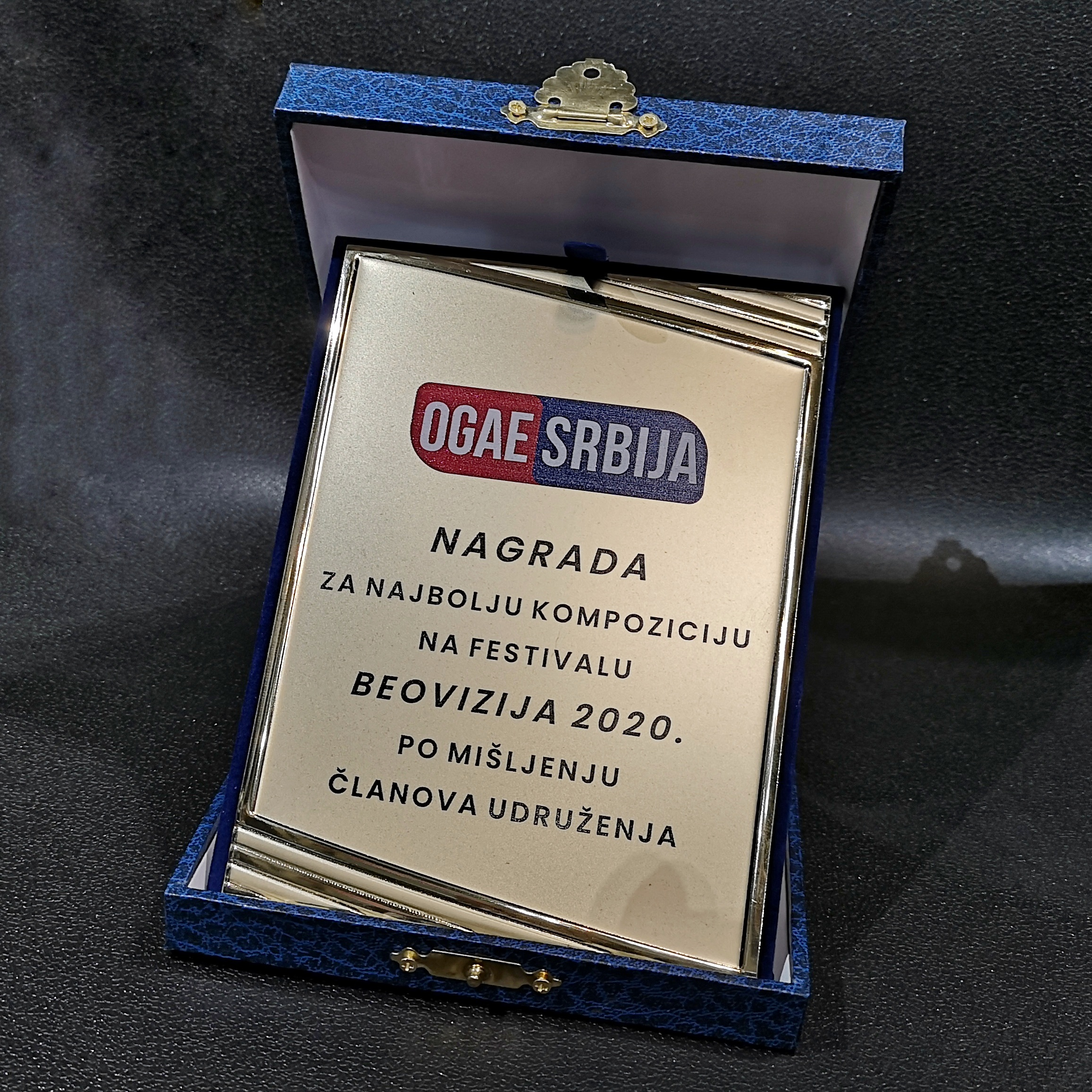 Награда ОГАЕ Србије - плакета